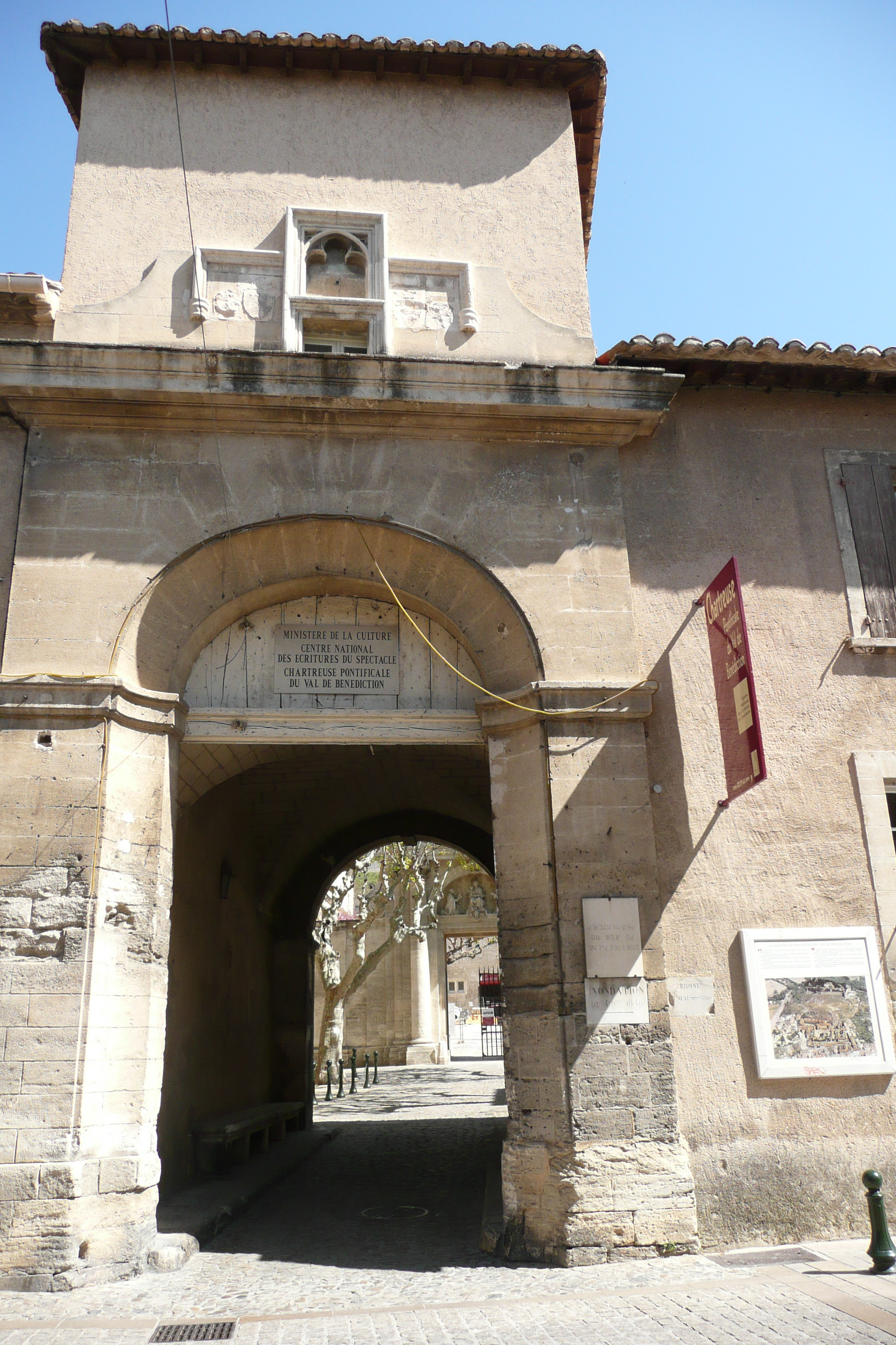 Entrée de la chartreuse pontificale du val de bénédiction à Villeneuve-lès-Avignons